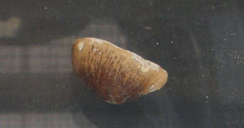 Fossil of Carinodens, an extinct mosasaur- Took the photo at De Groene Poort, Boxtel